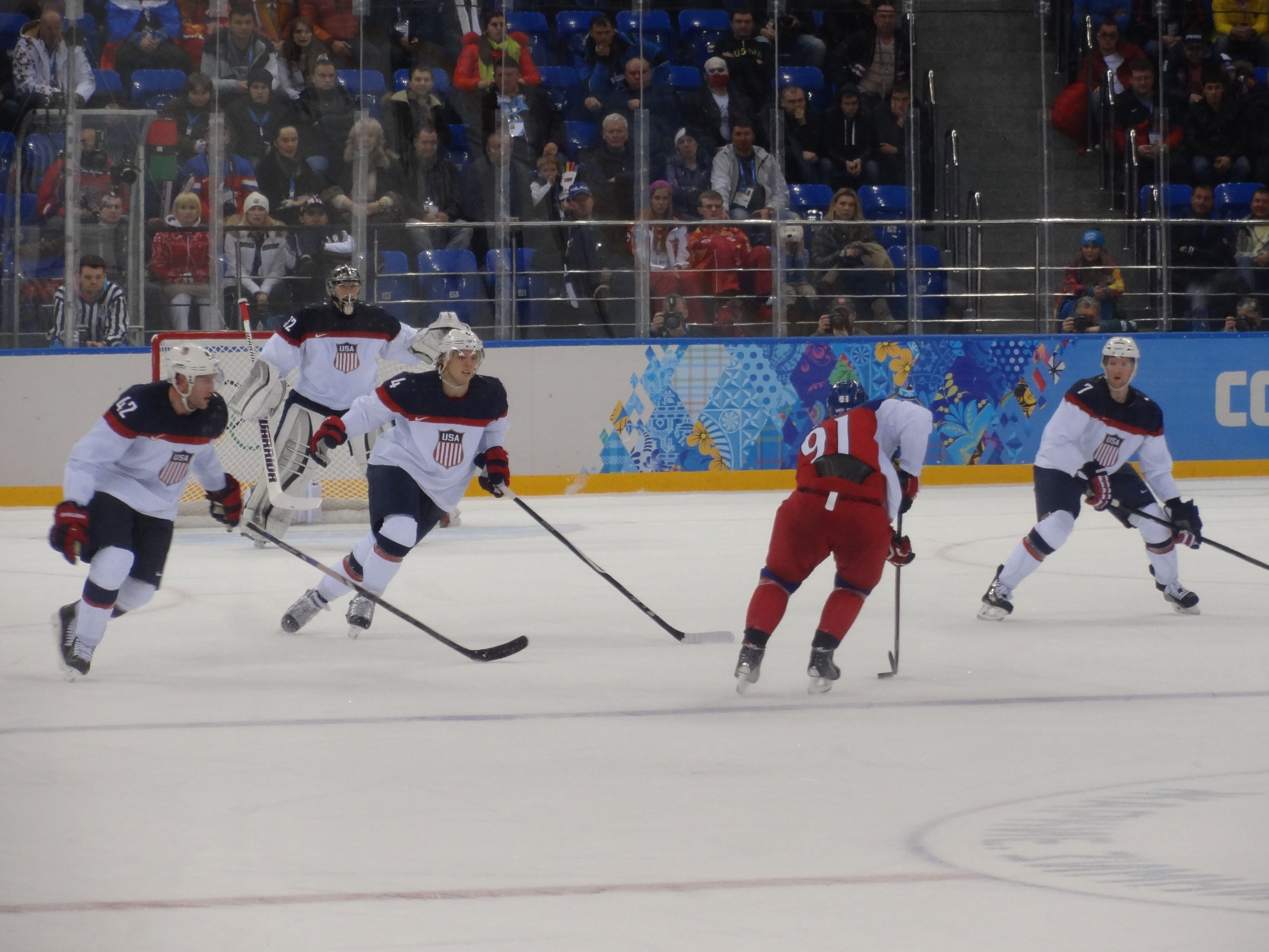 19 февраля, 21.00, «Шайба». Матч 1/4 финала олимпийского хоккейного турнира, сборная США обыграла Чехию.США – Чехия – 5:2 (3:1, 1:0, 1:1)